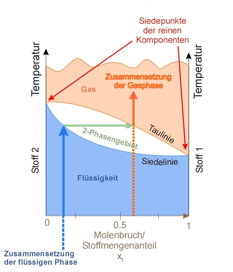 T-x-Diagramm am Beispiel einer einfachen Siedelinse